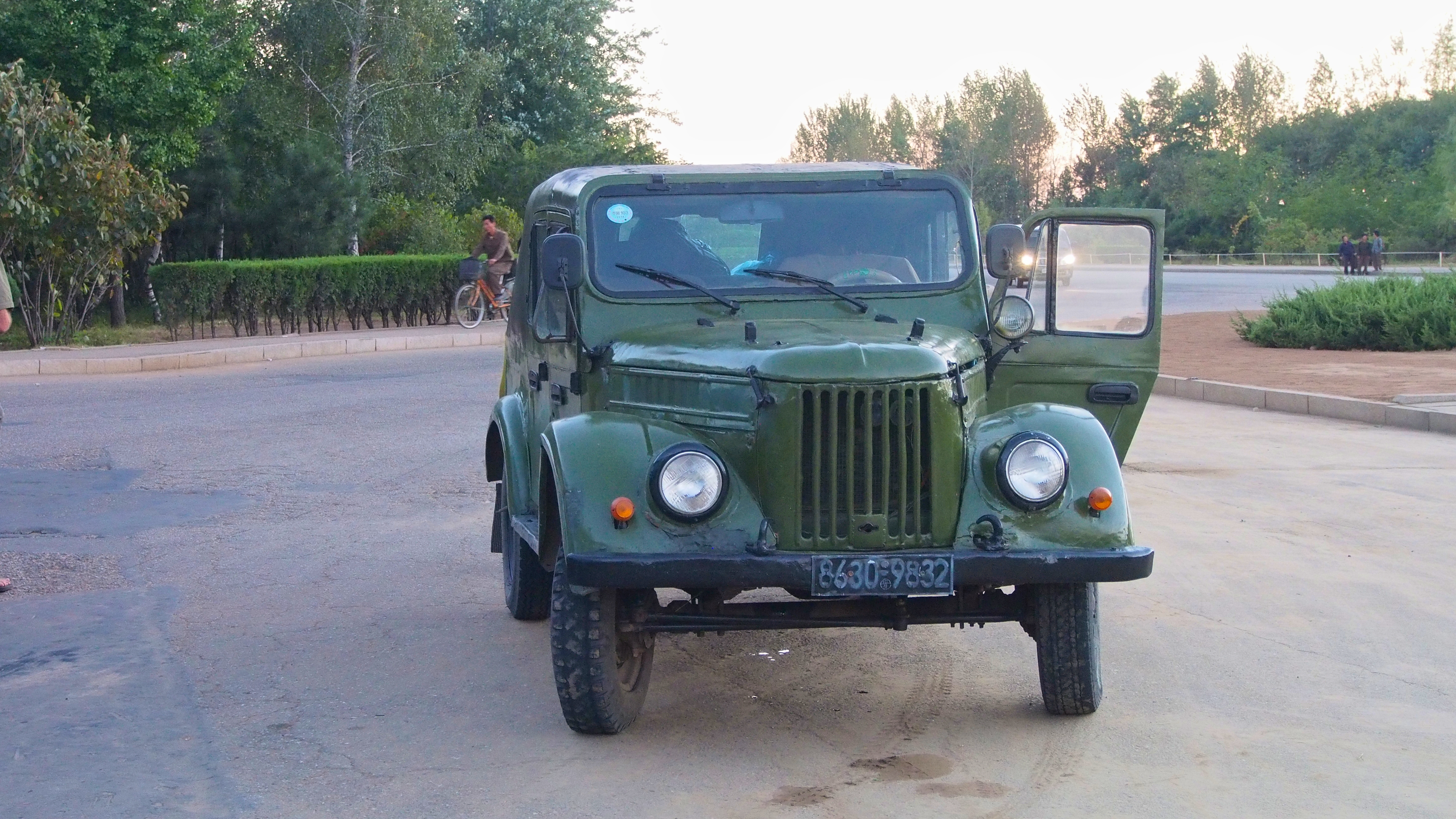 Old jeep, at Sariwon DPRK